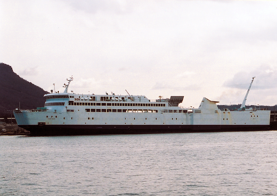 加藤汽船 神戸丸 （元四国フェリー 神戸丸（3代目））